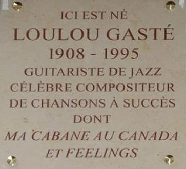 plaque au 8 rue saint ferdinand 75017